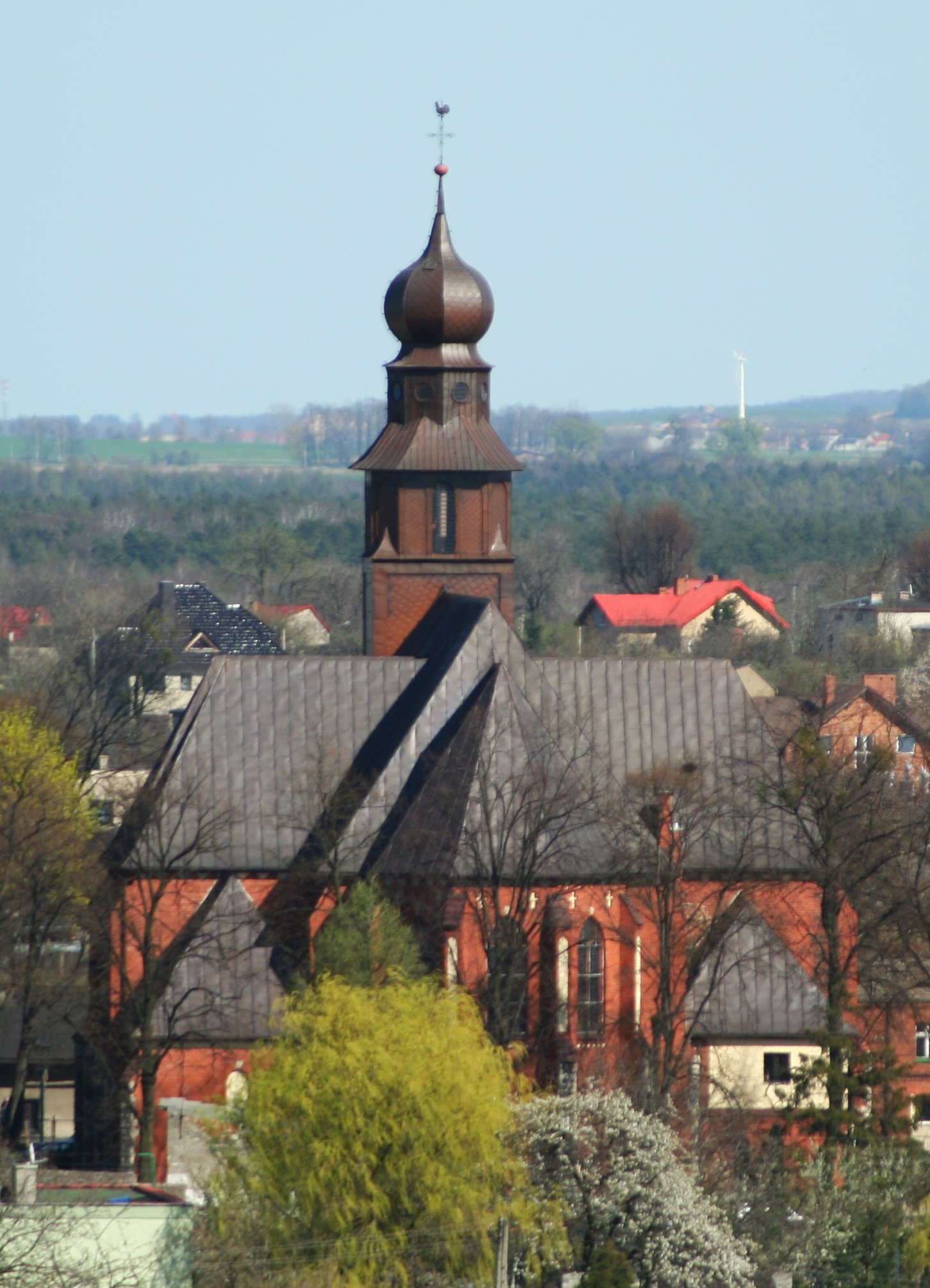 kościół pw. Najświętszego Serca Pana Jezusa w Koszęcinie, powiat lubliniecki, województwo śląskie. zdjęcie wykonane zostało z wieży widokowej